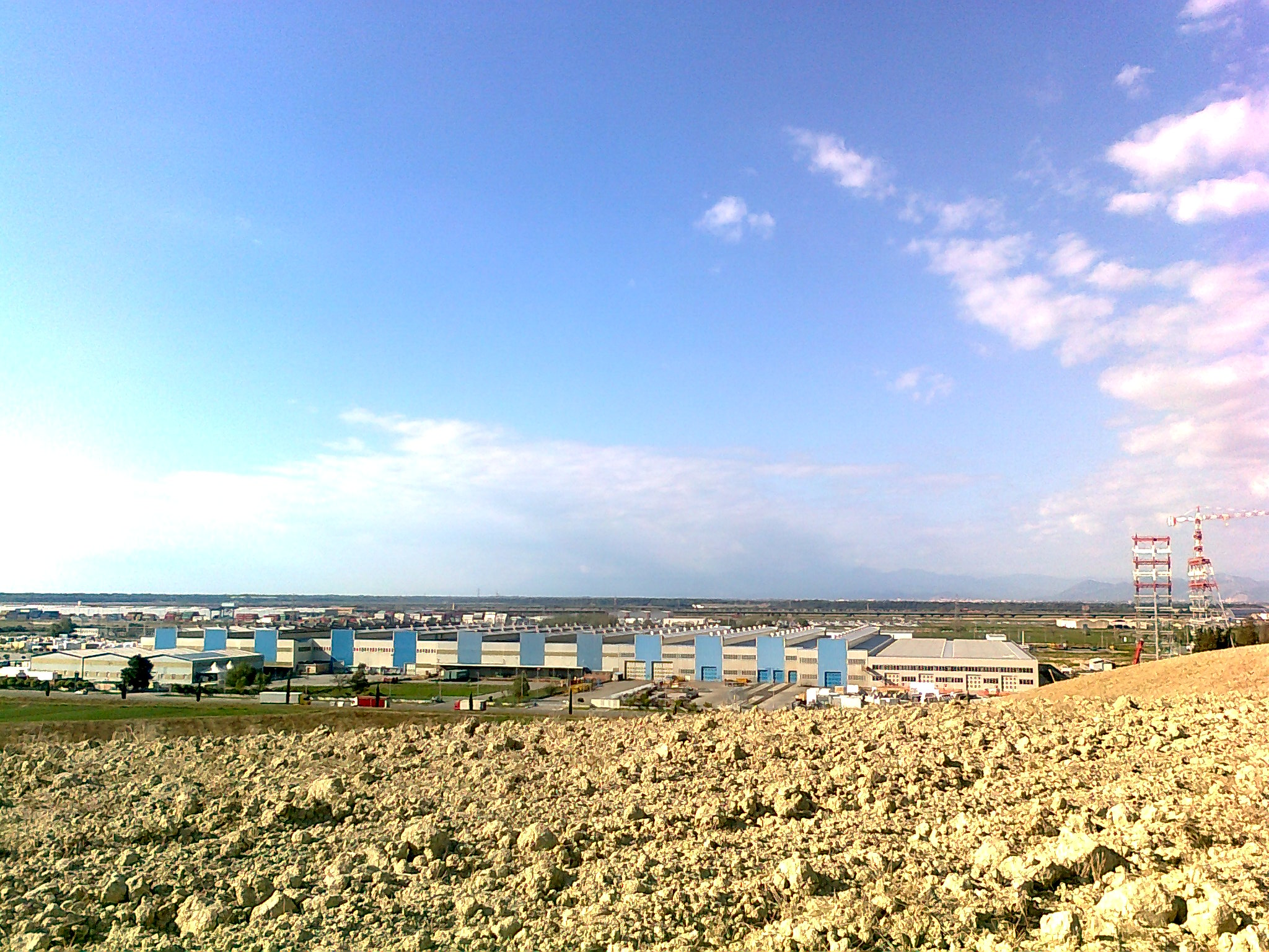 Guasticce, fraz. di Collesalvetti (LI): veduta dell'area industriale dalle colline circostanti e, sullo sfondo, l'Interporto Toscano Amerigo Vespucci.